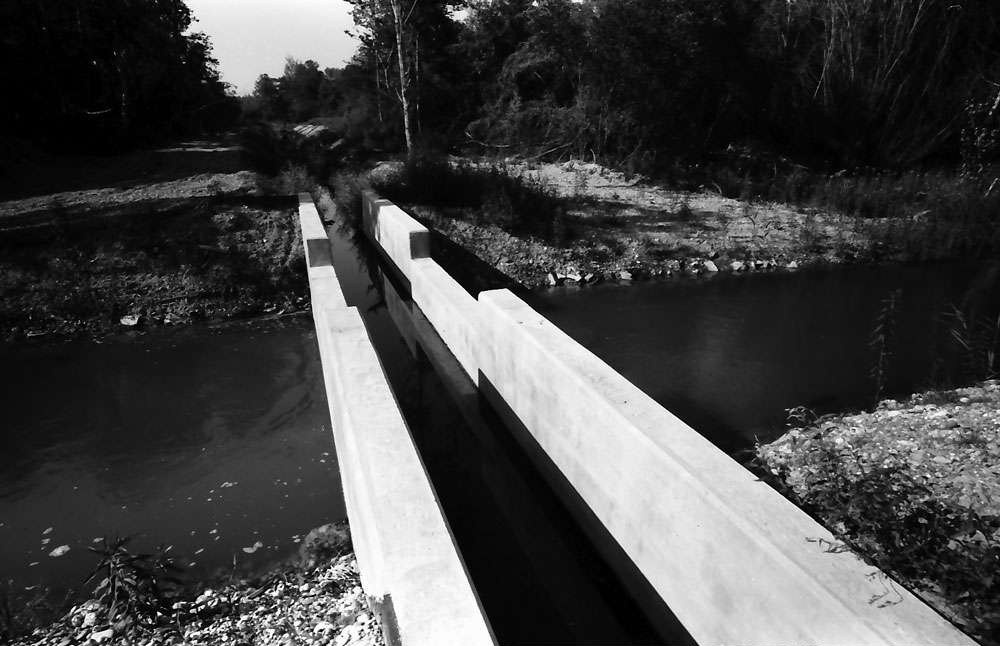 W 134 Sammlung Willy Pragher I: Filmnegative I, Bildordner 3-307 / ca. 1930-1992 Rhein (und Kinzig) [Filmnegative, Ordner 0118] Altrhein Jechtingen: Kanalaquädukt über Altrheinarm bei Jechtingen